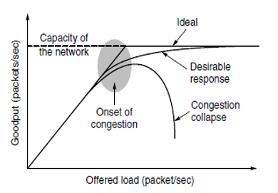 Şəkil 1. Çox yüklənmə olanda performans kəskin şəkildə azalır